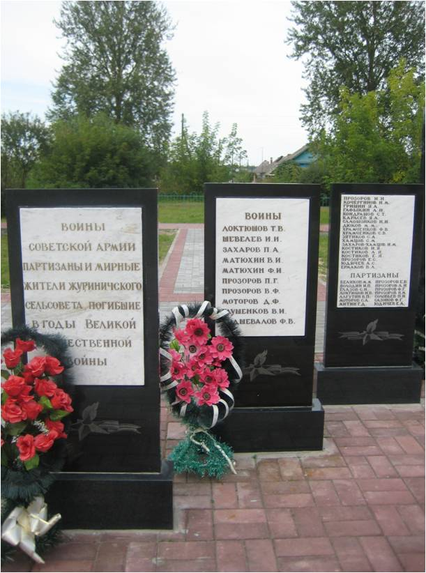 Мемориальный комплекс: сквер, Журиничи, Брянский район, Брянская область